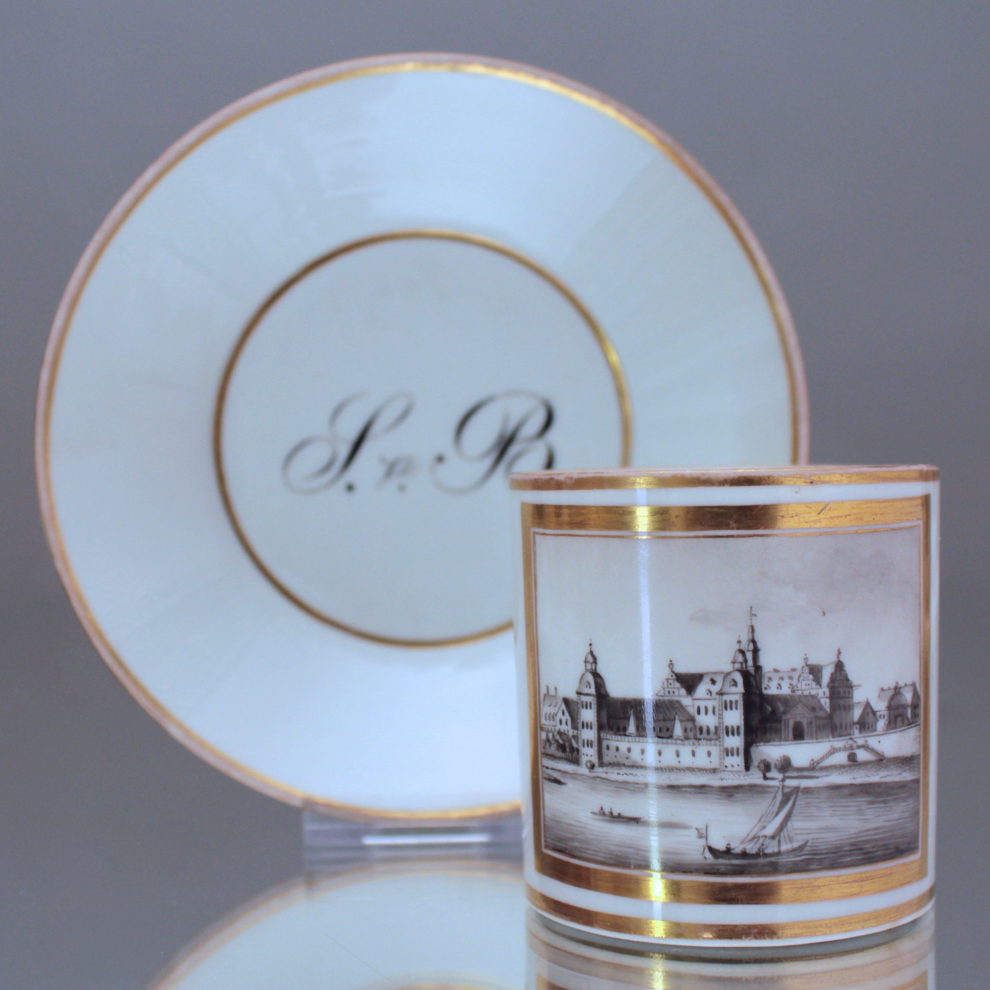 Gothaer Porzellanmanufaktur, Ansichtentasse (Motiv: Schloss Coswig), Anfang 19. Jahrhundert